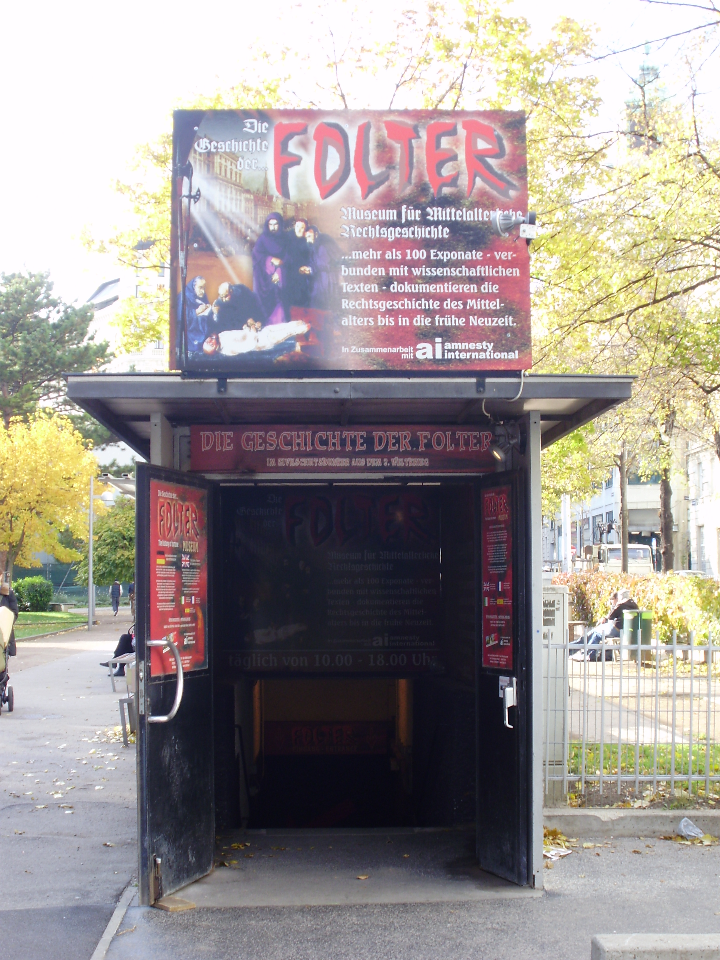 Museum für mittelalterliche Rechtsgeschichte – Wien – Eingang